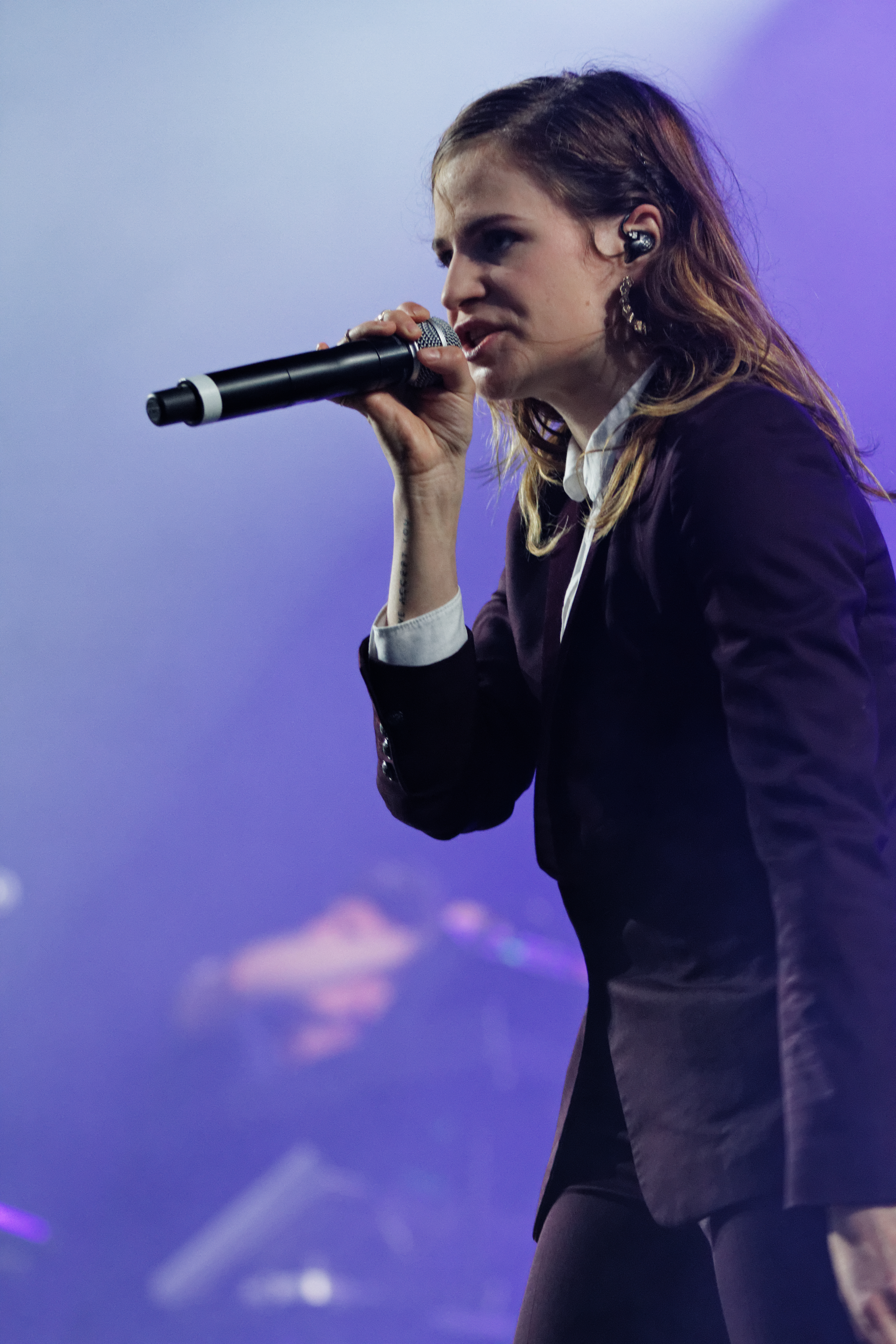 Christine and the Queens en concert sur la scène Grall lors du festival des Vieilles Charrues 2014.